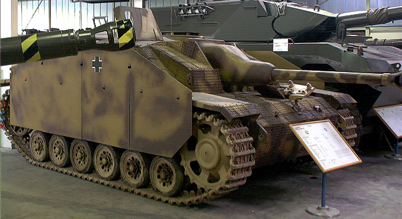 Sturmgeschütz III Ausführung G, späte Version mit Saukopfblende mit Kettenschürzen und Zimmerit-Anstrich ausgestellt in der Wehrtechnischen Studiensammlung Koblenz